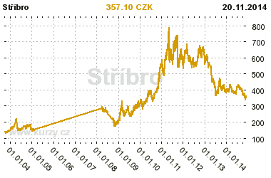 Kakao - Cena komodity.